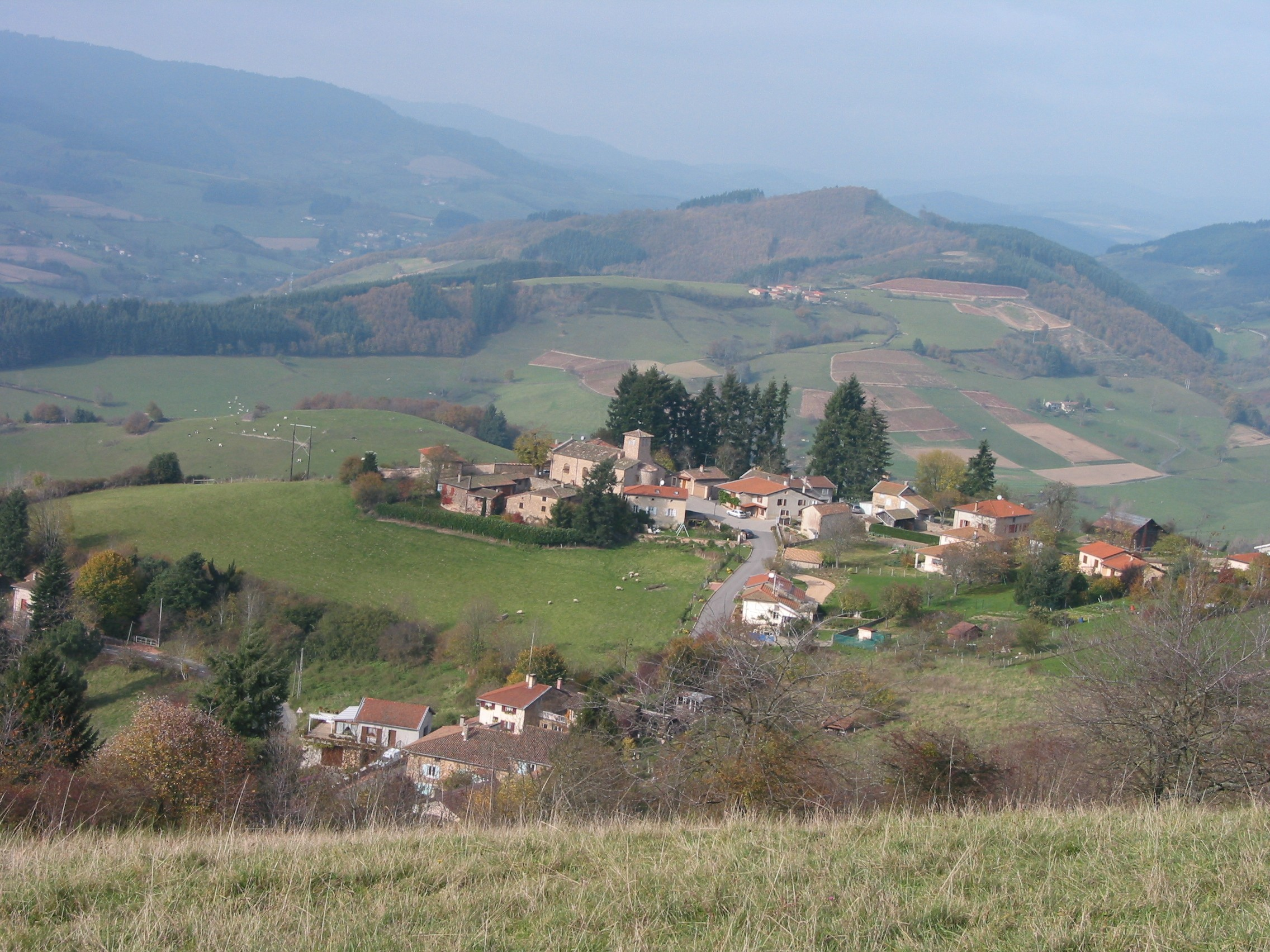 Vue sur le village de Chambost, intégré dans la commune de Chambost-Allières.